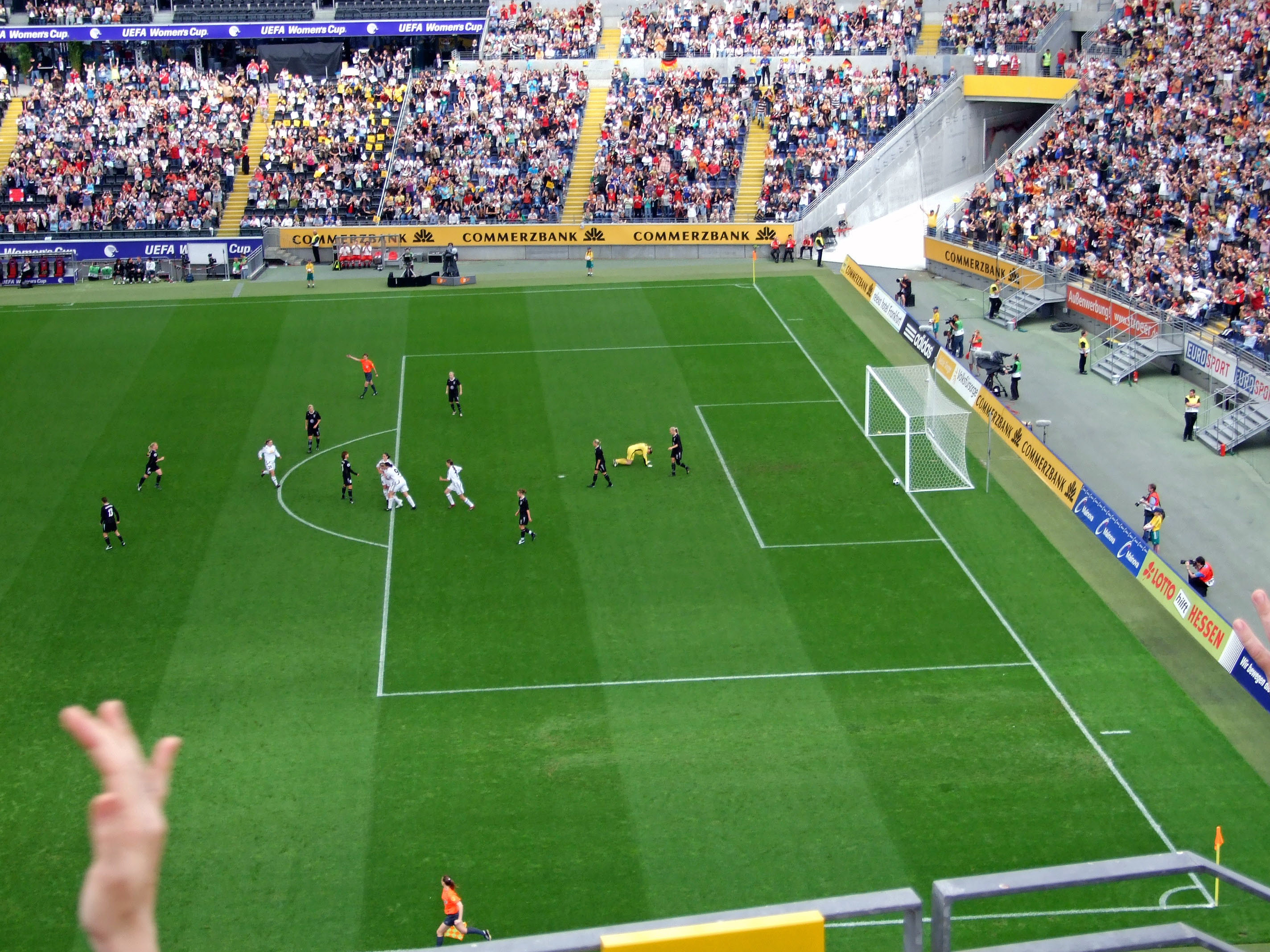 1. Halbzeit, 1:0 vom 1.FFC gegen Umeå, Commerzbank-Arena bei dem UEFA-Women's-Cup 2007/2008, Finalrückspiel zwischen 1. FFC Frankfurt und Umeå IK damfotboll